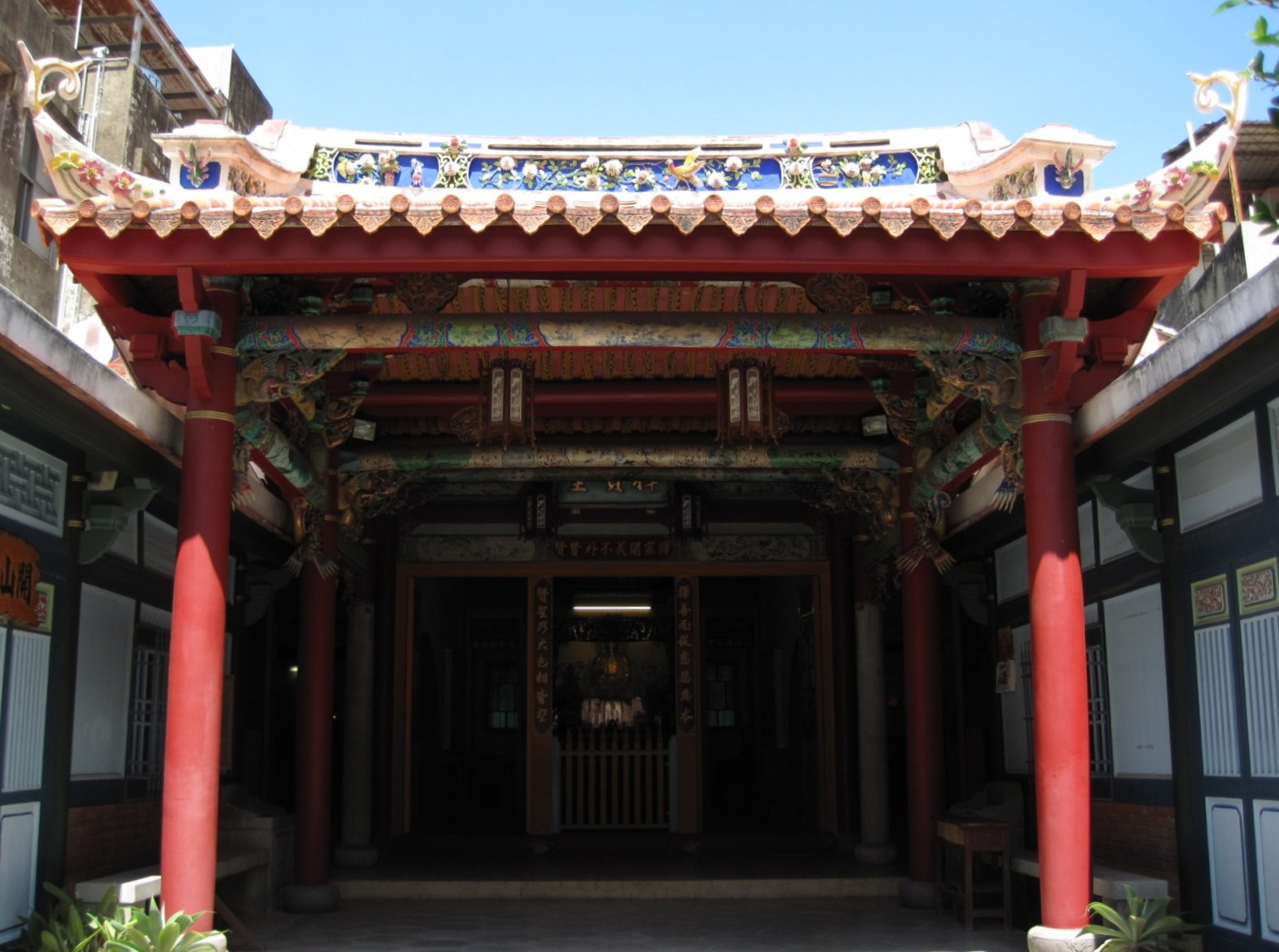 臺南市古蹟「擇賢堂」